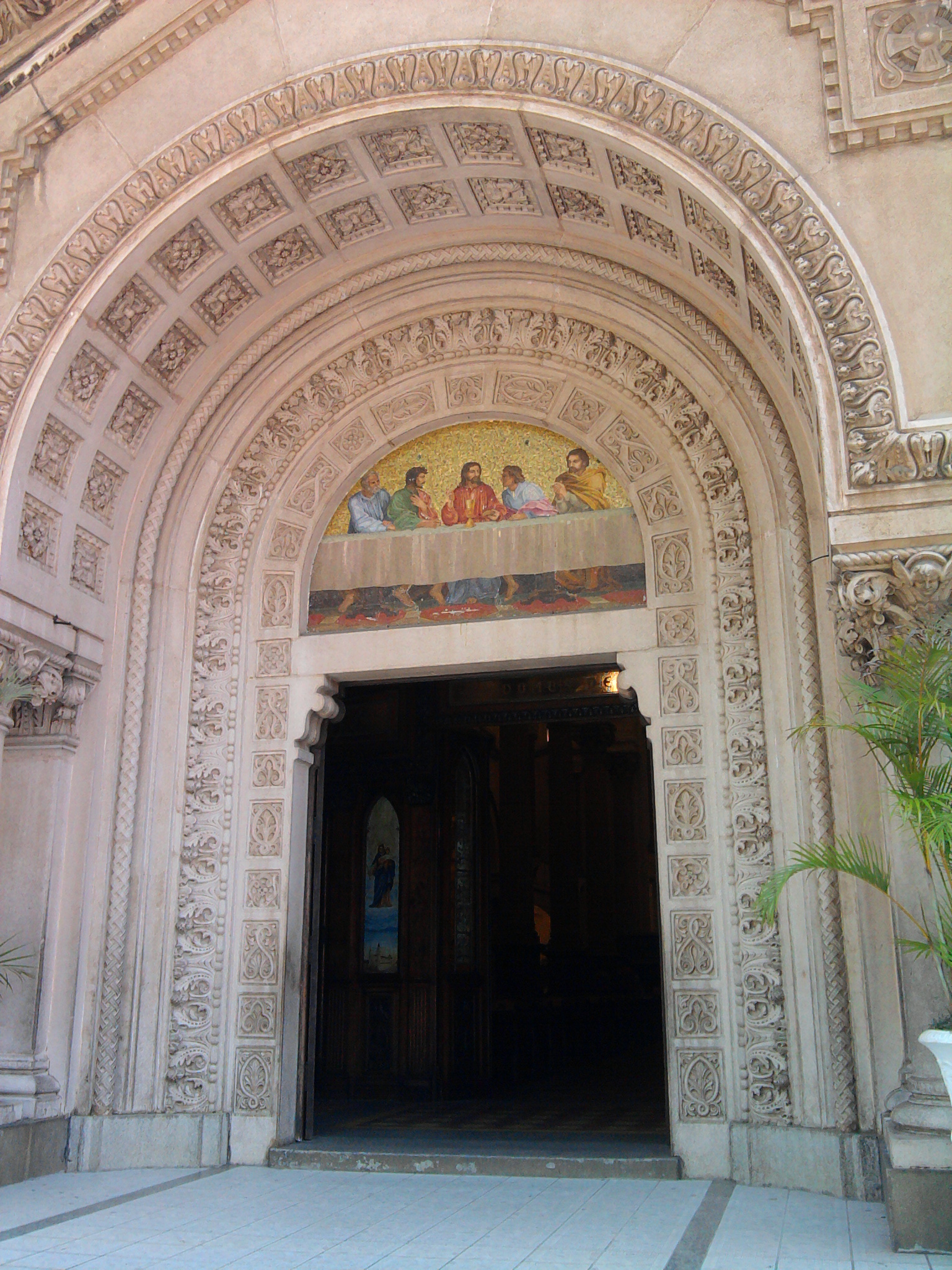 Portal da Paróquia de Nossa Senhora Auxiliadora do bairro Bom Retiro em São Paulo, também conhecida como igreja de Dom Bosco por fazer parte do conjunto arquitetônico do Instituto Dom Bosco.